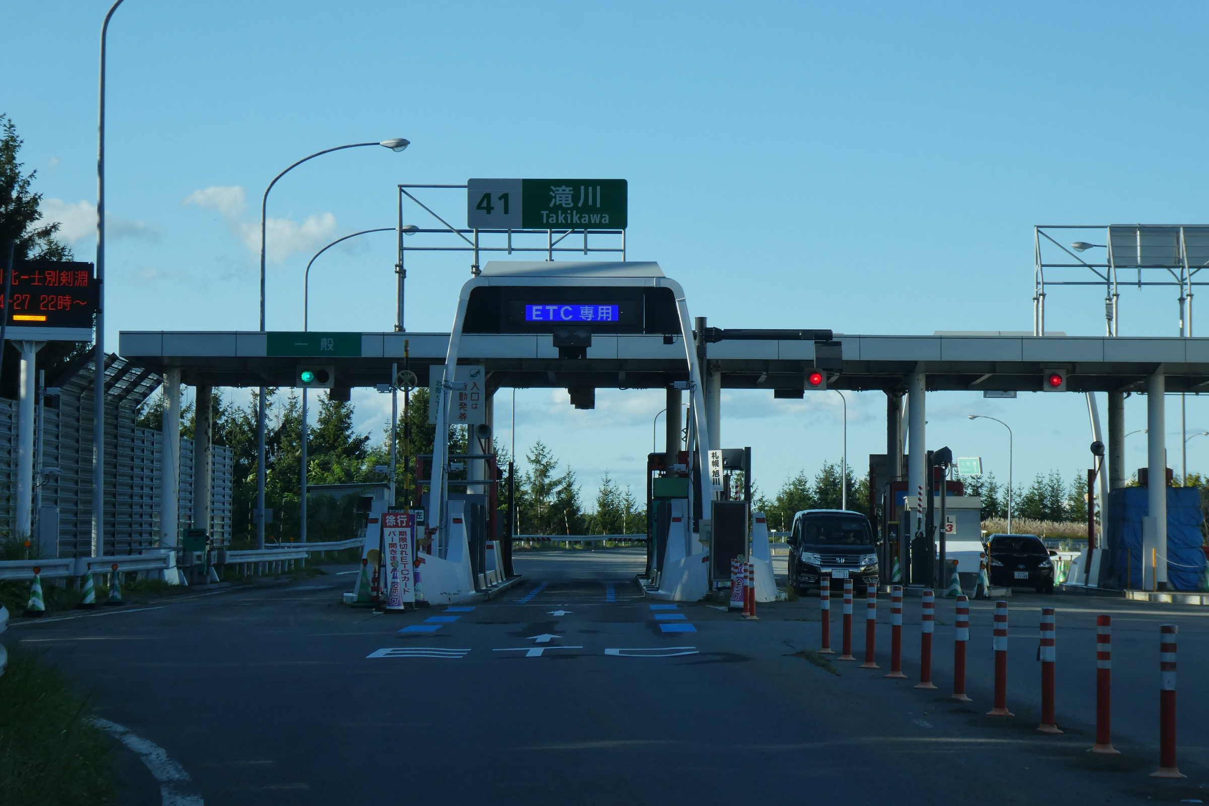 道央自動車道 滝川インターチェンジ